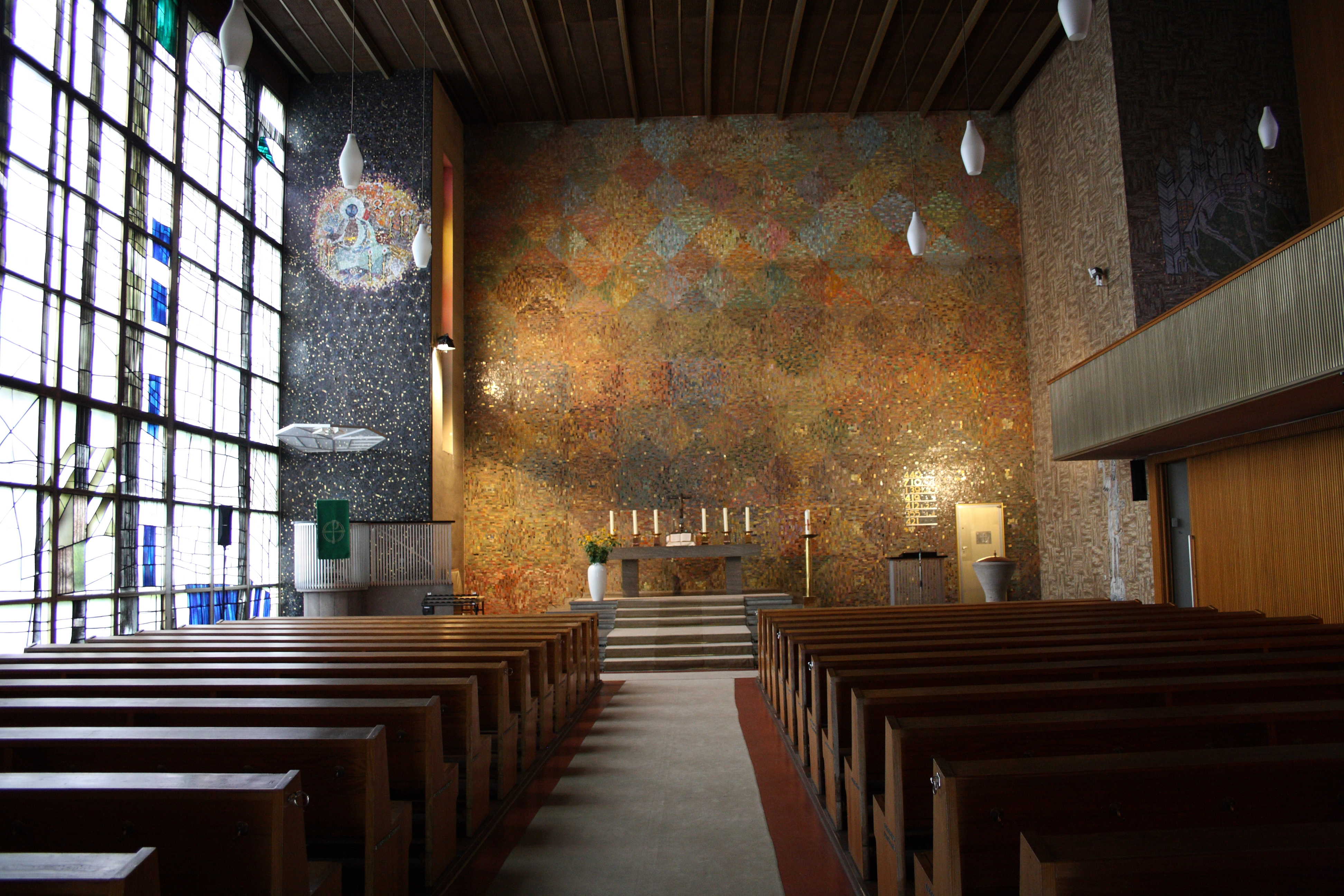 Die KFG von innen